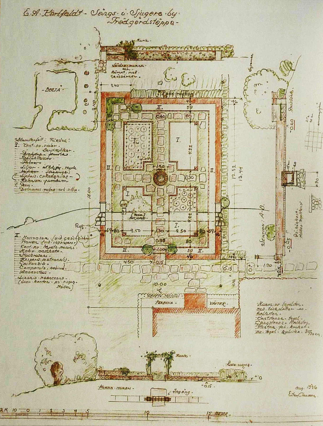 Ester Claessons ritning för trädgården på Karlfeldtsgården Sångs